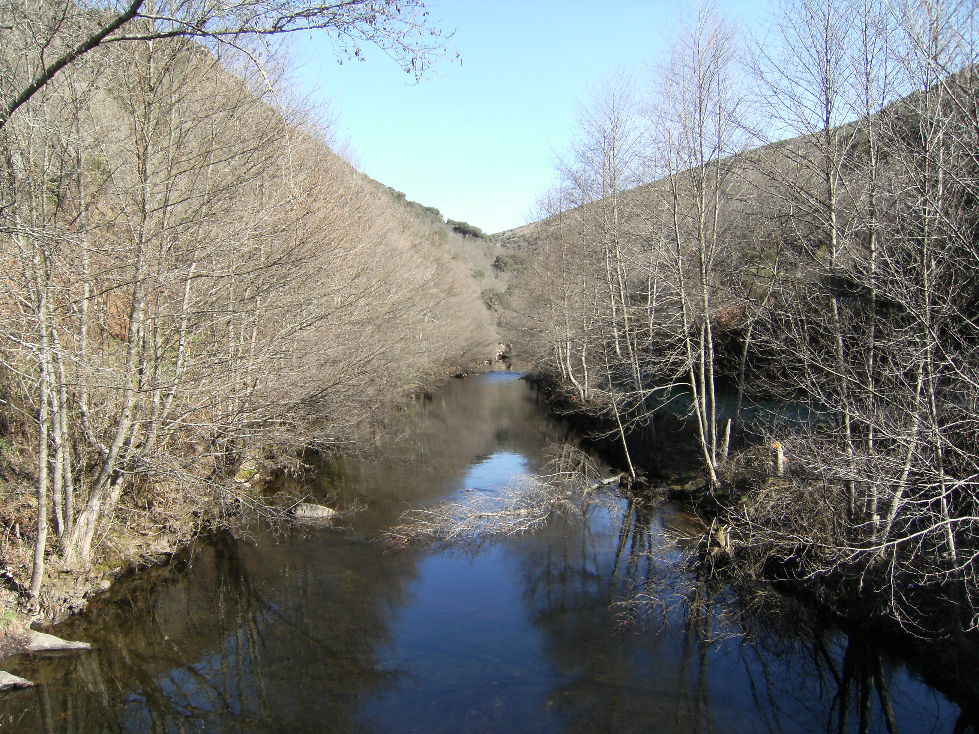 Rio Mente próximo à aldeia de Passos de Lomba.